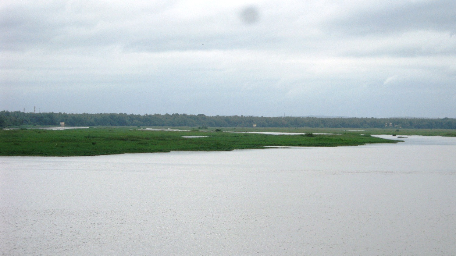 View from Chamravattam Bidge